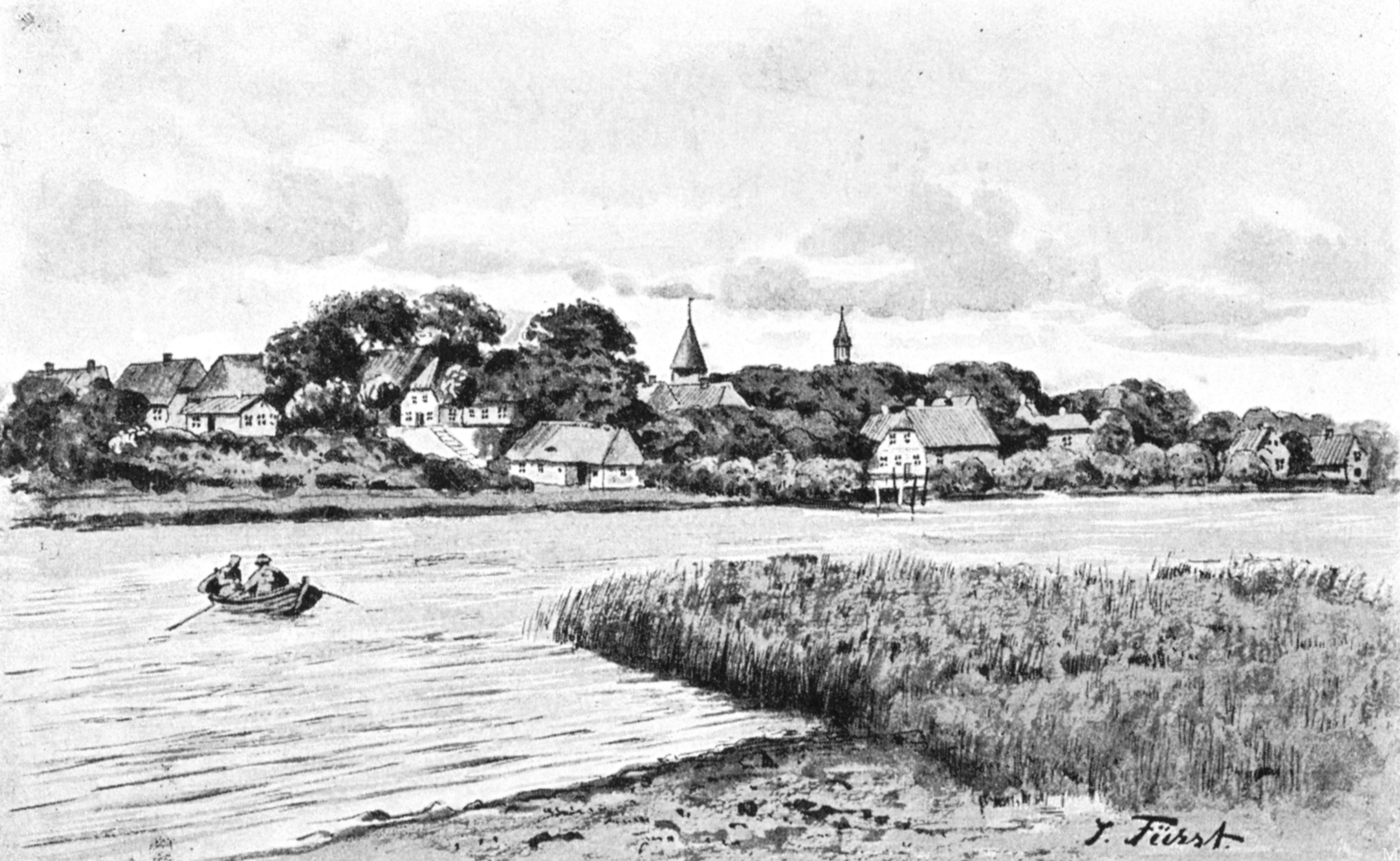 Schwabstedt um 1895, Zeichnung von Julius Fürst